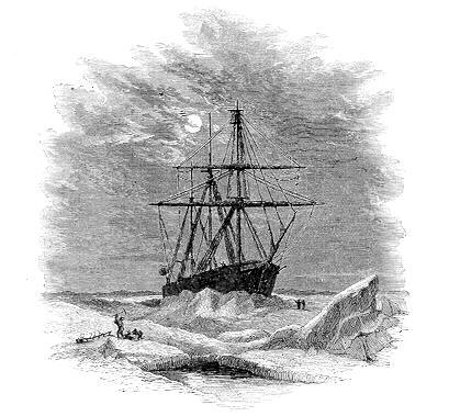 A Tegetthoff hajó a jégen